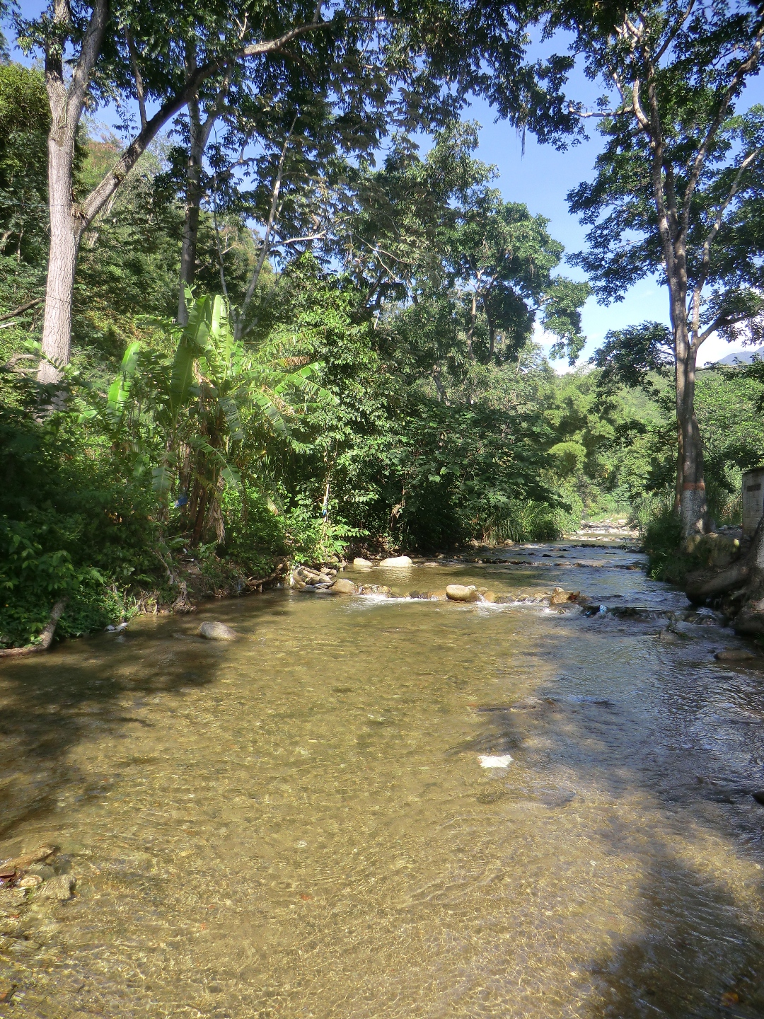 Parte del río Guatire, que atraviesa la ciudad homónima en el estado Miranda, Venezuela.